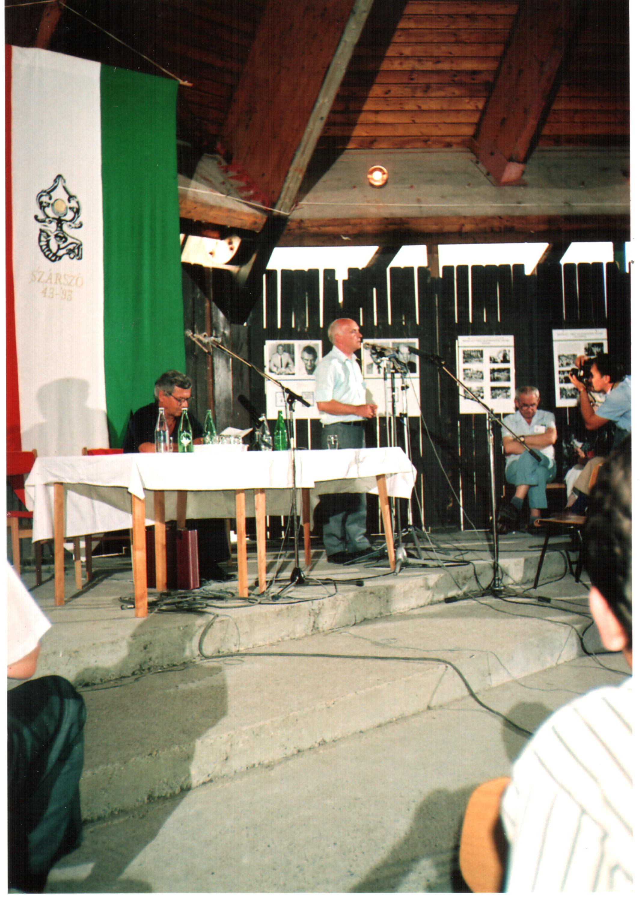 Bíró Zoltán, Fekete István. A felvétel 1993. augusztus hó 24- én készült Balatonszárszón. Püski Sándor az 1943 –as Szárszói Magyar Élet Konferencia 50. évfordulójának tiszteletére szervezte a találkozót. A találkozón jelen voltak: Püski Sándor, Csurka István (21,22,23, Bíró Zoltán (13), Szűrös Mátyás 28), Jobbágyi Gábor, Surján László (29), Tábori László (32), Bégány Attila (8,32,37), Elekes Andor (5,6,8,35), Füzessy Tíbor (14), 1943.. augusztus. 23.-28 –a között Püski Sándor Magyar Élet találkozót szervezett nemzeti kérdések megvitatására a Soli Deo Gloria balatonszárszói üdülőjében. Diákok, írók, politikusok, hírlapírók, egyesületi vezetők, munkás- és parasztfiatalok egyaránt a résztvevők között voltak. A vitákban részt vettek a KALOT, az EMSZO és a Hivatásszervezet tagjai is. A megbeszélések témája az 1939 óta tartó világháború, a magyar. nép állapota és a magyar nemzet háború utáni jövője. Az ismertebb előadók és fölszólalók: Németh László (1901-75), Kodolányi János (1899-1969), Veres Péter (1897-1970), Erdei Ferenc (1910-71), Karácsony Sándor (1891-1952), Féja Géza (1900-78), László Gyula (1910-98), Szabó Pál (1893-1970), Jócsik Lajos (1910-80), Nagy István (1904-77), Szabédi László (1907-59). A legelevenebb érdeklődést Erdei Ferenc és Németh László vitája váltotta ki. Erdei az esélyek alakulásából már kirajzolódni látszó 'szocializmus', utóbbi a kapitalizmus és a szocializmus közötti 'harmadik út' mellett érvelt. A résztvevők döntő többsége az utóbbival rokonszenvezett. Források: Szárszó '93 Az 1993 évi szárszói tábor előadás és megbeszéléssorozata Püski, Budapest, 1993 Borbándi Gyula: A magyar népi mozgalom. New York, 1983. (és Bp., 1989:336.) - Szárszó 1943. Budapest, 1983. - Püski Sándor: Könyves sors - magyar sors. Budapest, 2002. Őrző a strázsán Somodi István: Szárszó – Modell vagy emlék?